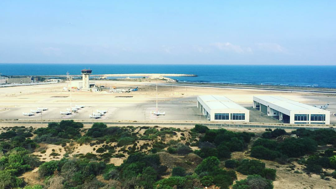 מבט לשדה מכיוון מזרח וברקע מגדל הפיקוח